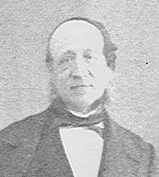 Giurista, magistrato e politico italiano